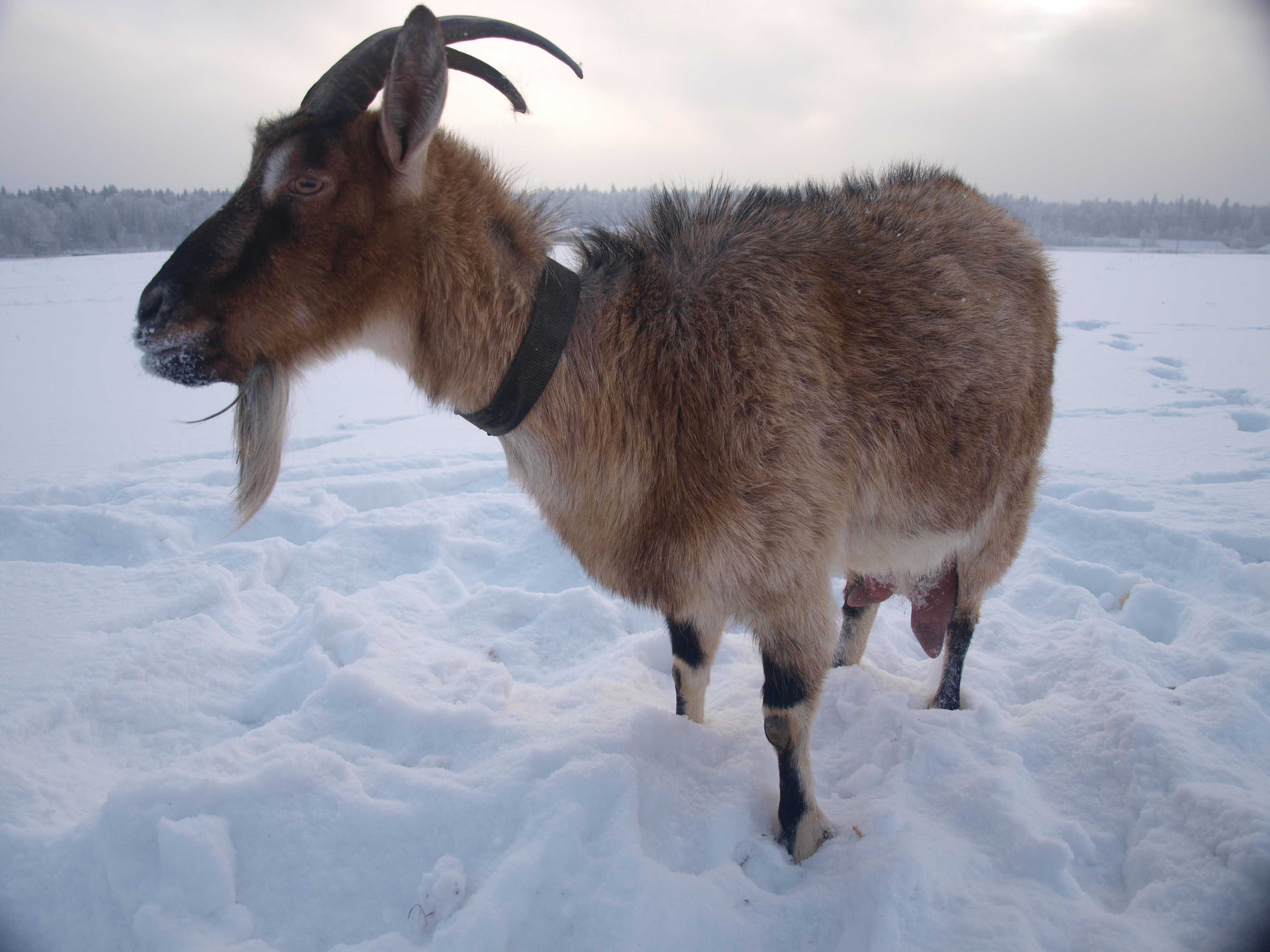 Знаменитое животное - коза Меркель.